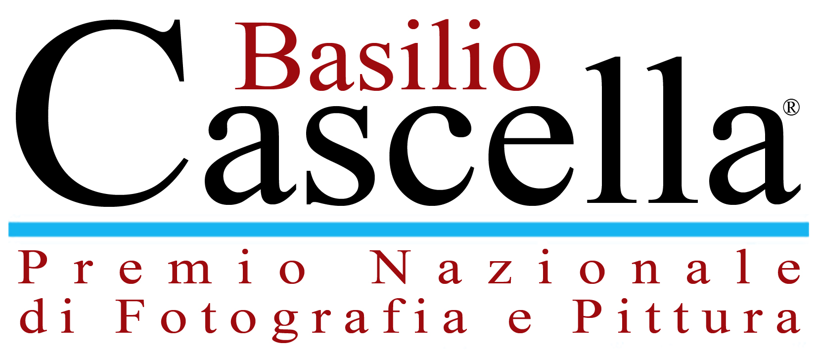 Logo Premio Basilio Cascella